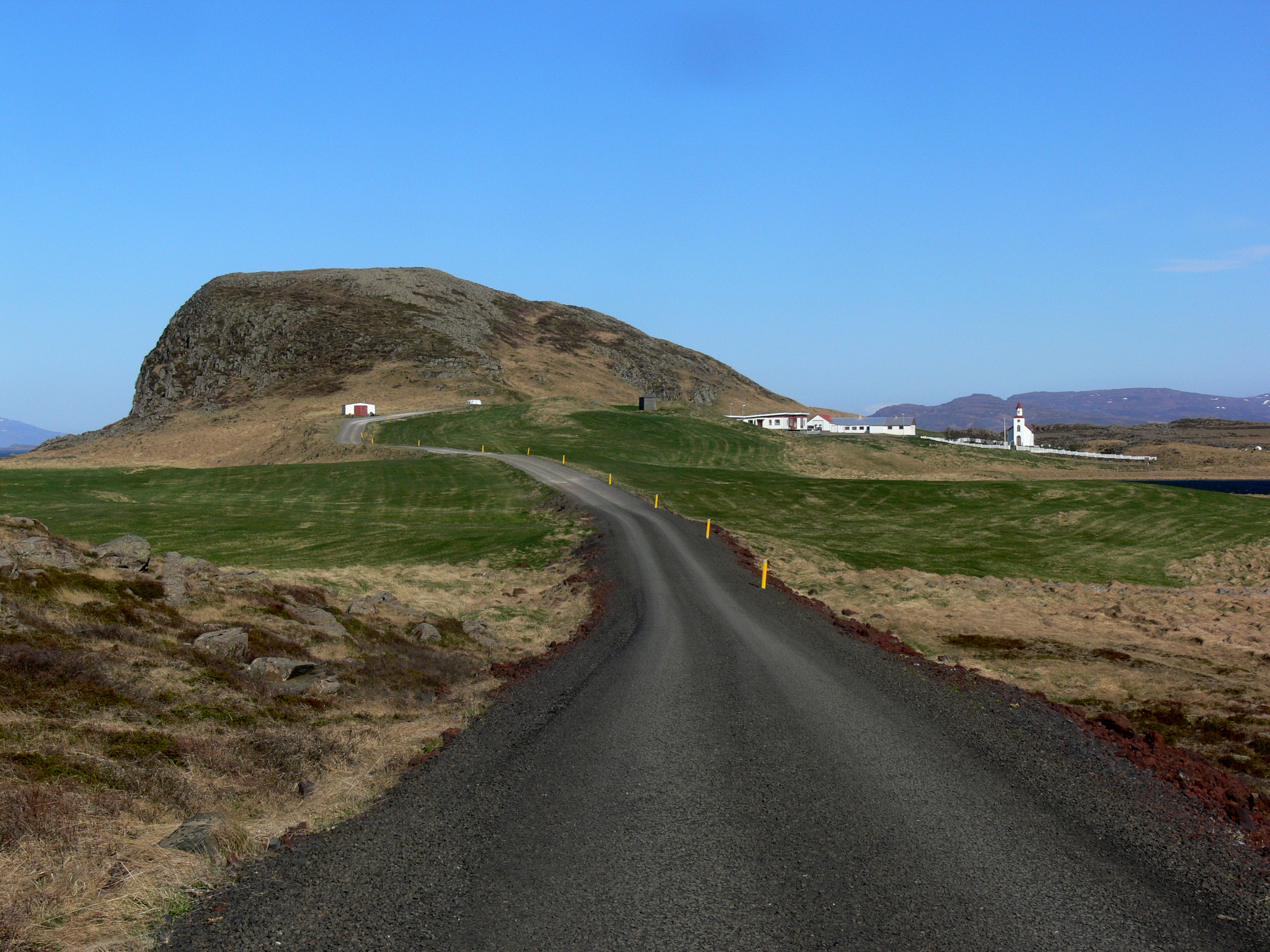 Helgafell bei Stykkishólmur. Hier lebte und starb Guðrún, eine der Hauptpersonen der Laxdæla saga. Sie ist auf dem Friedhof der Kirche begraben.